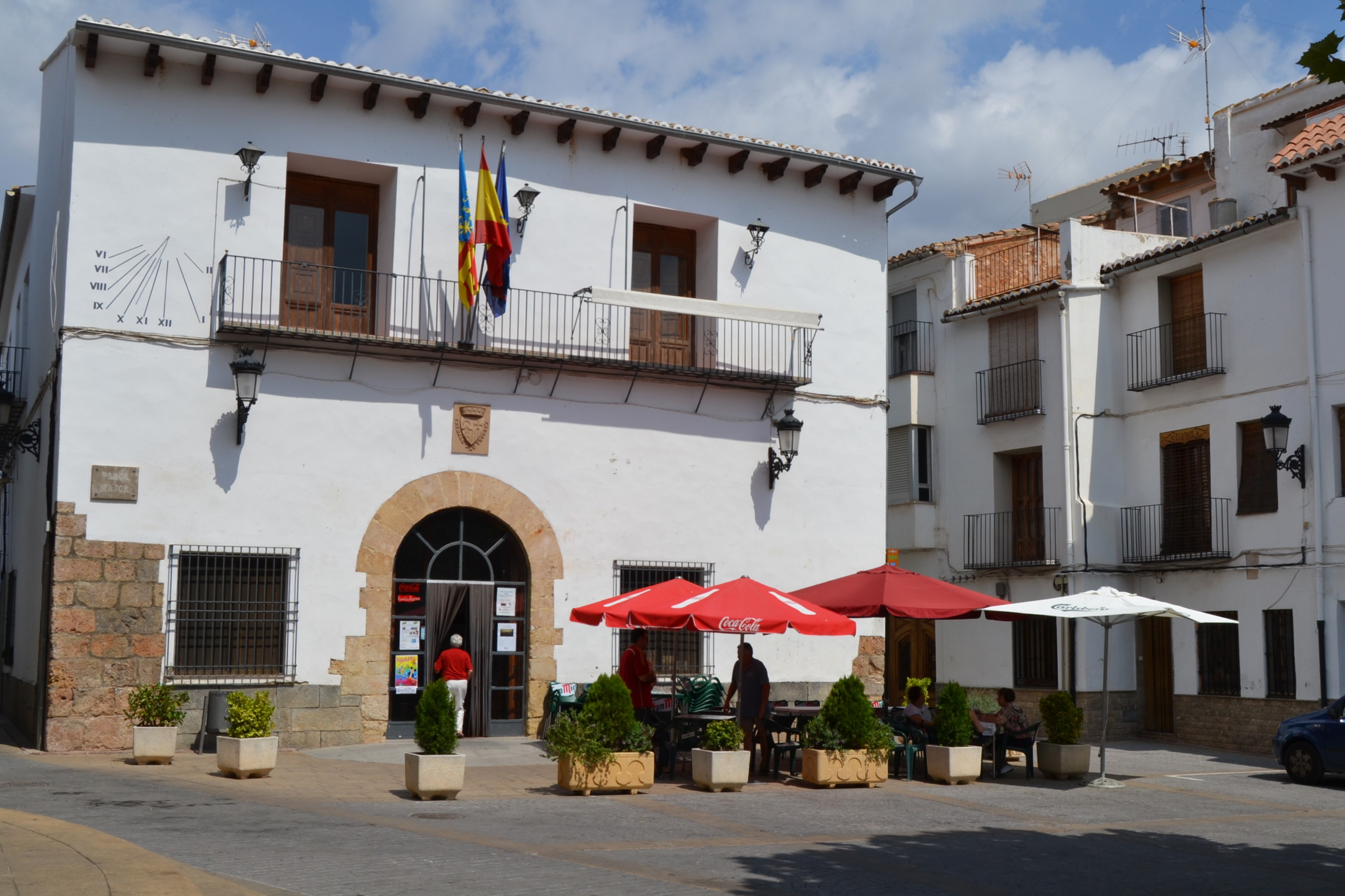 Antiga torre defensiva d'Algar de Palància, actual ajuntament i bar-casino.